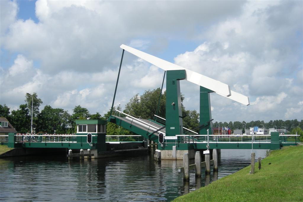 Jousterbrug over het Nieuwe Heerenveense Kanaal (Hearrenfeanster Kanaal) (bridge, canal)